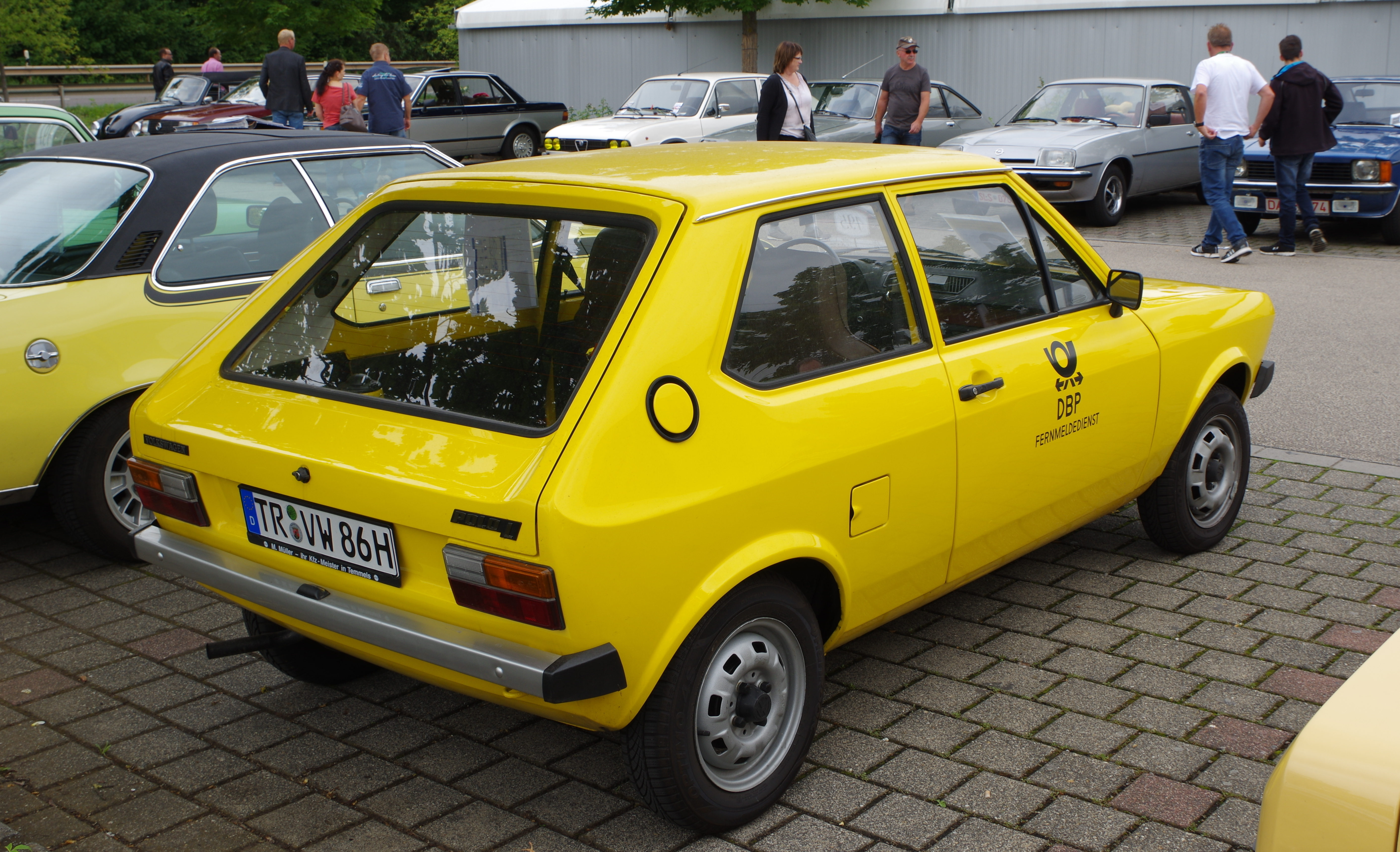 VW Polo, Typ 86, 1977, 40 PS, 889 cm³